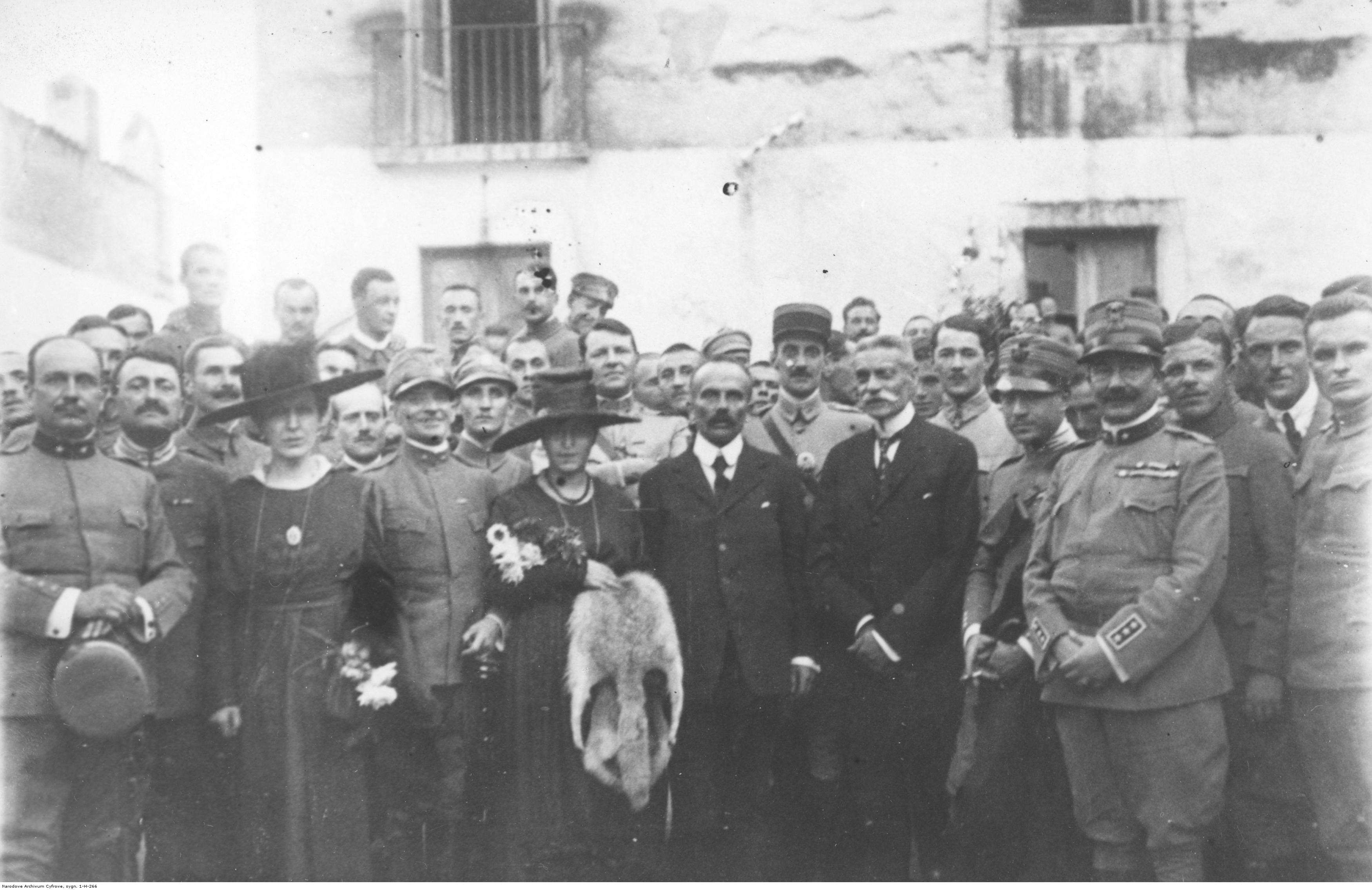 Przedstawiciel Polskiego Komitetu Narodowego Jan Zamorski w obozie jenieckim w Casagiove. Koncern Ilustrowany Kurier Codzienny - Archiwum Ilustracji. Sygnatura: 1-H-266